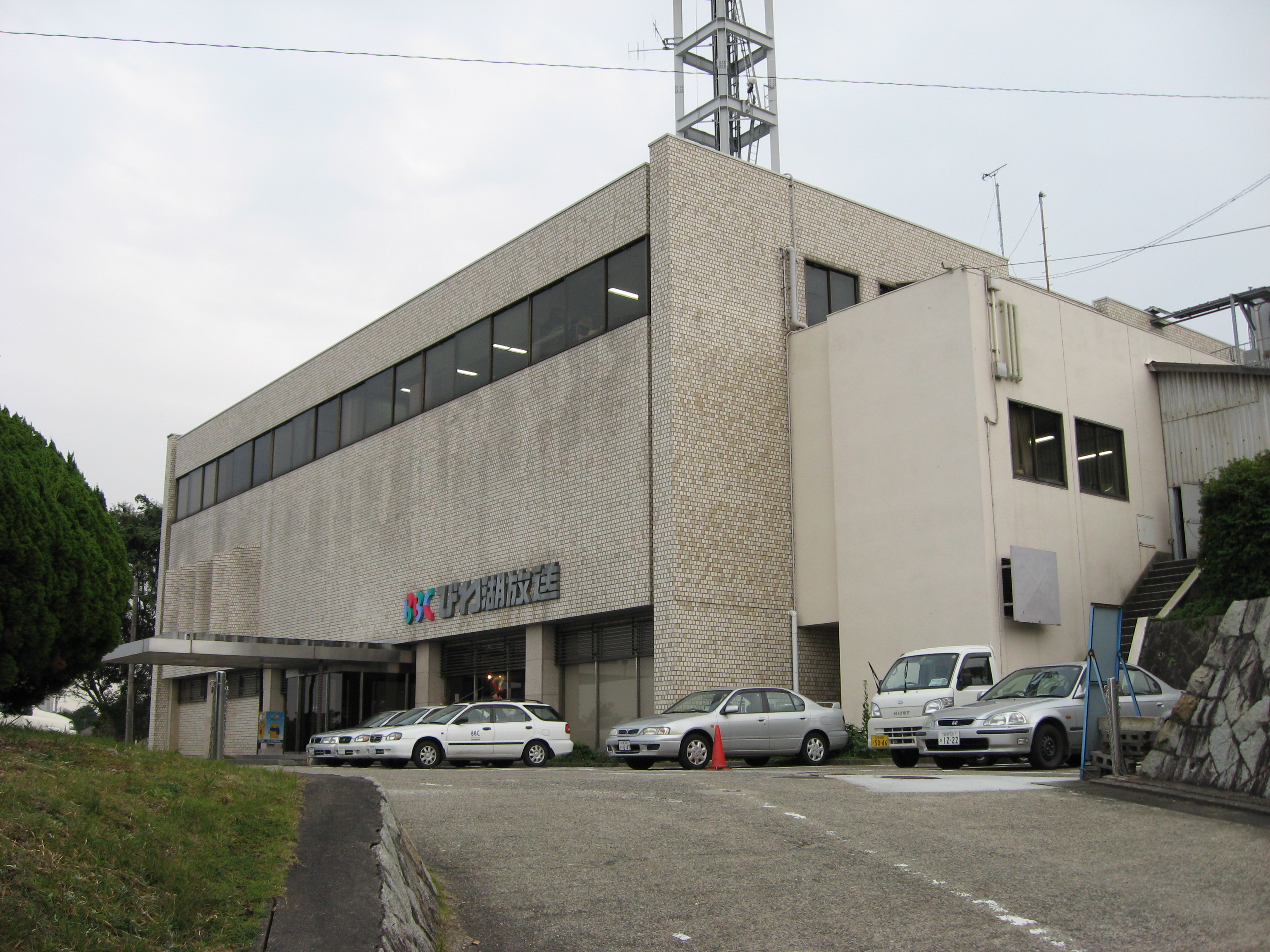 Biwako Broadcasting Co.,Ltd. in Otsu, Shiga, Japan